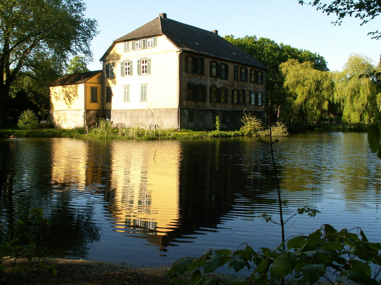 Rückansicht von Schloss Patthorst